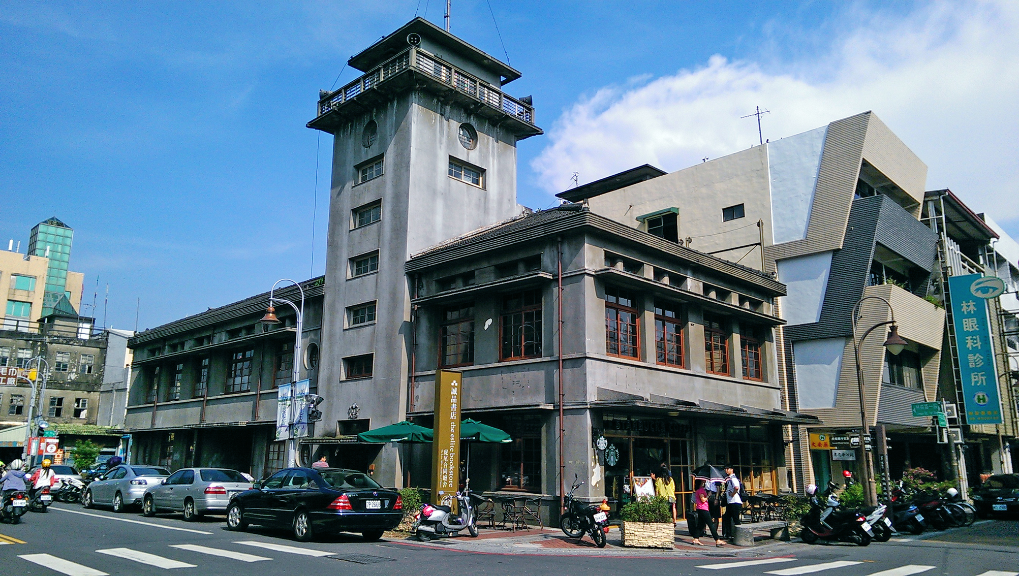 虎尾合同廳舍2014.8